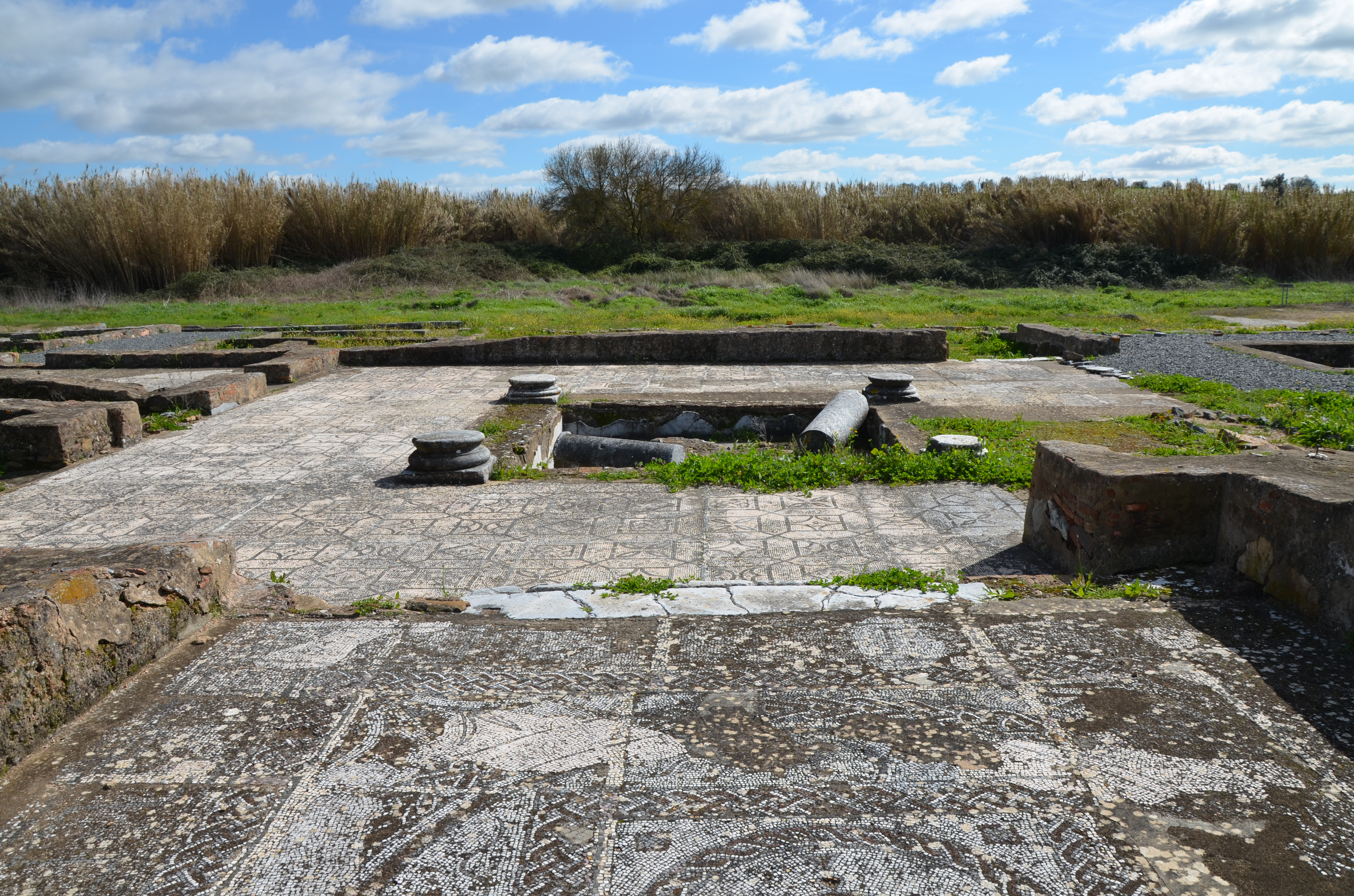 Roman Villa of Pisões, Portugal Roman villa, Pisões